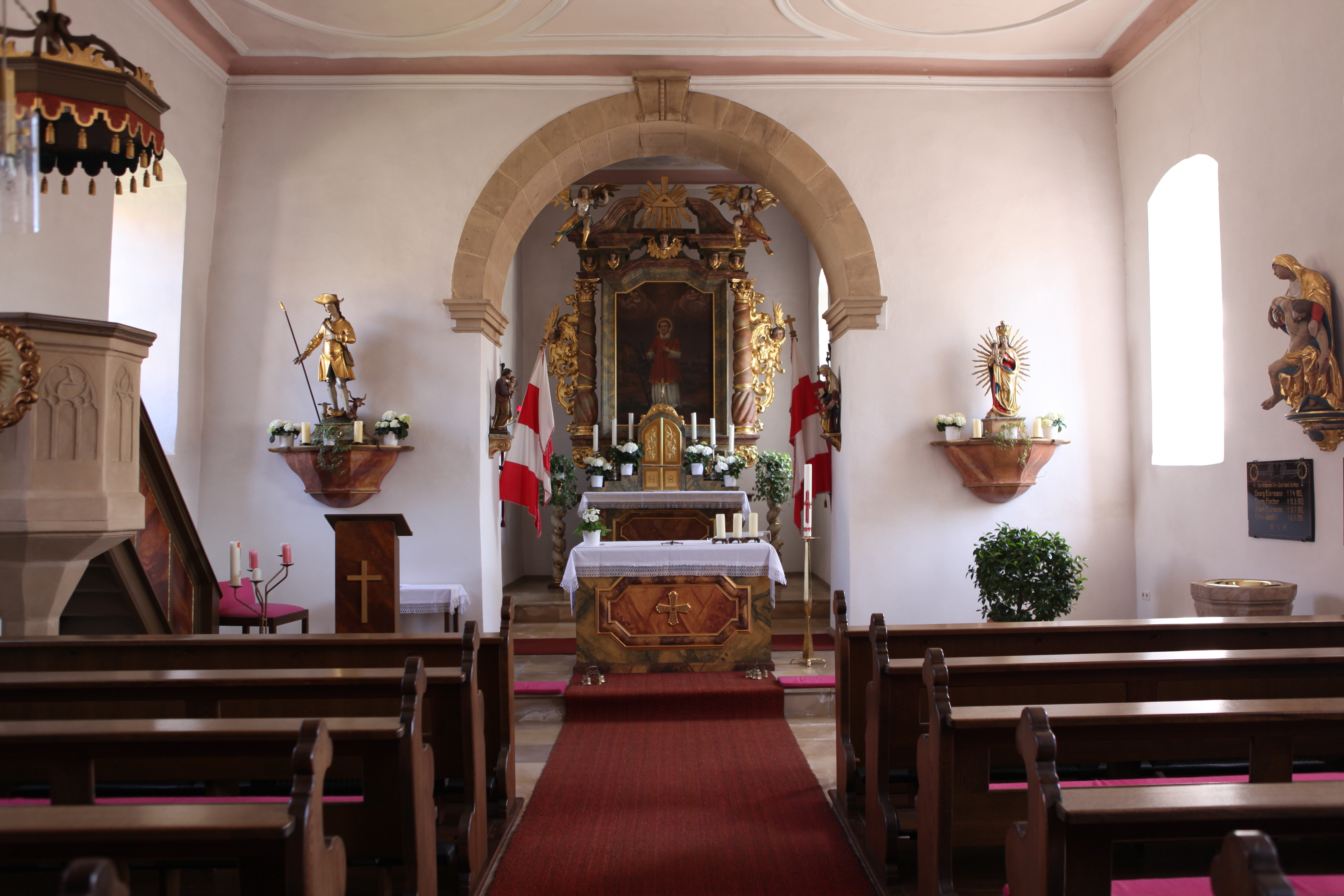 Katholische Filialkirche St. Laurentius, Rothenberg